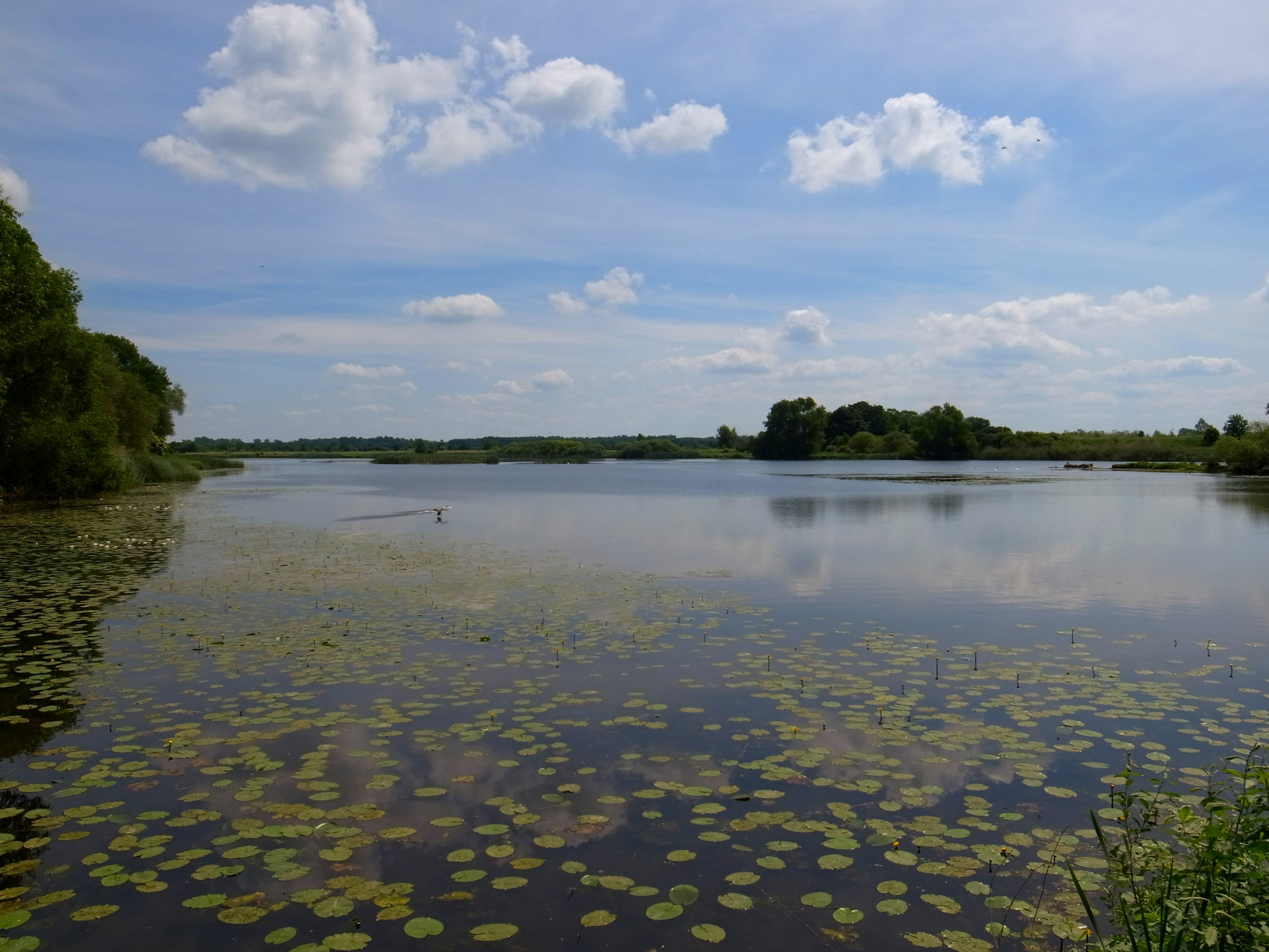 Klieken, Altarm Alte Elbe im Naturschutzgebiet Saarenbruch Matzwerder